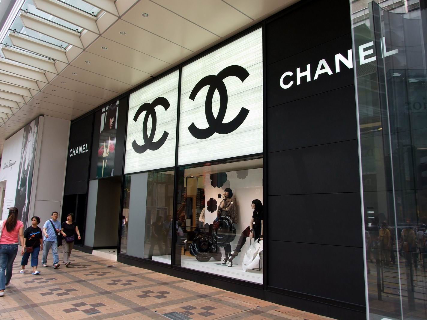 香奈儿尖沙咀海洋中心分店